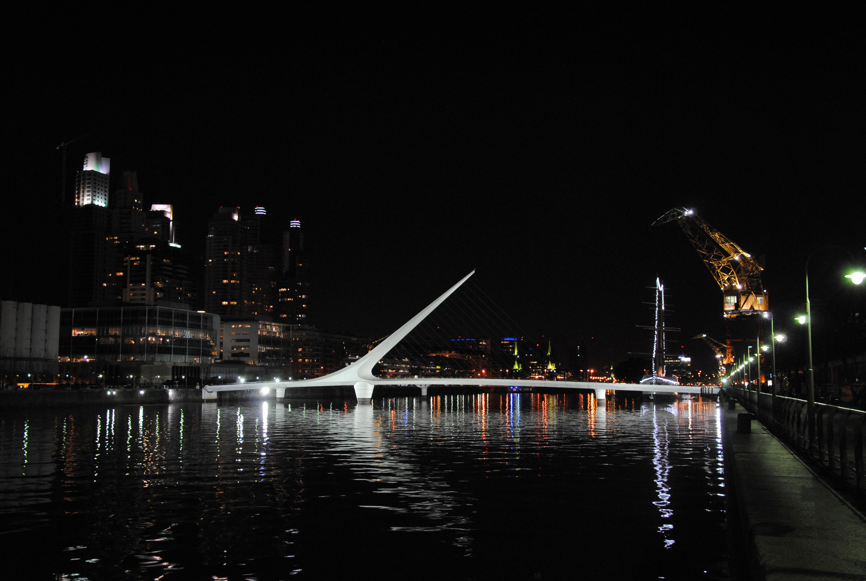 Buenos Aires, Argentina